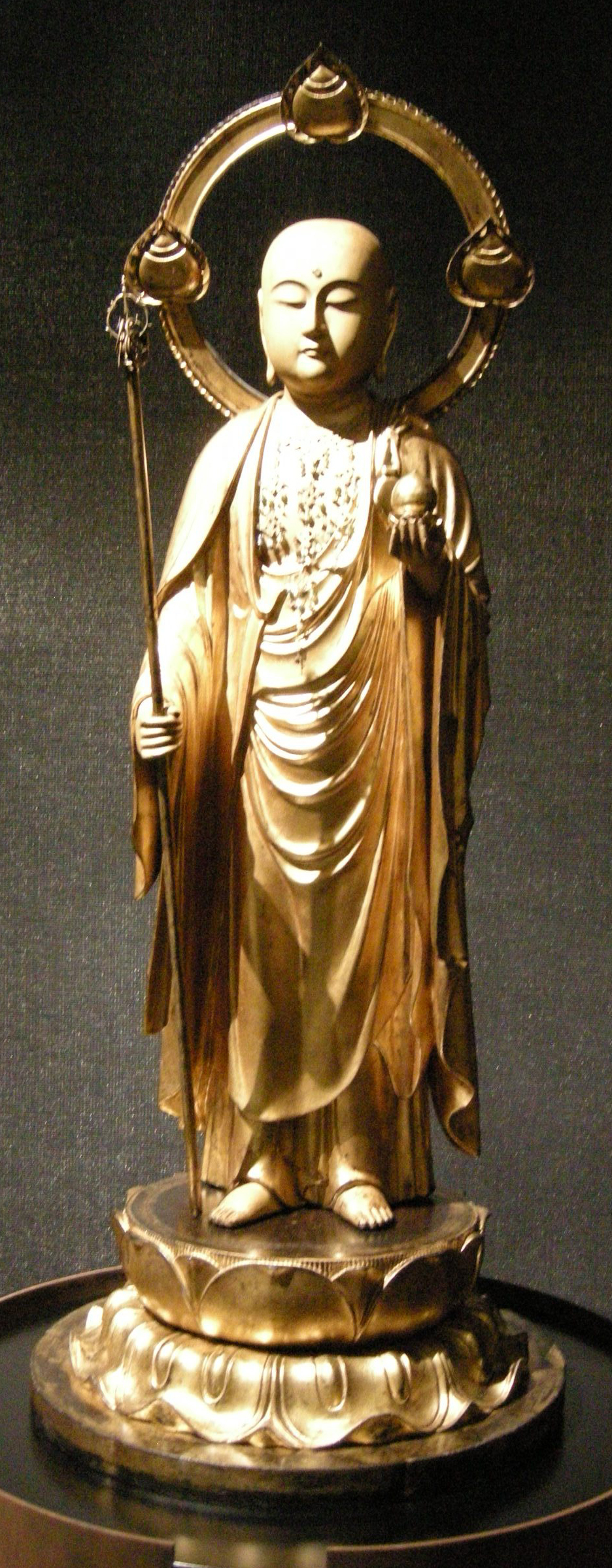 Bodhisattva jizo con aureola circolare, periodo muromachi, XV sec.